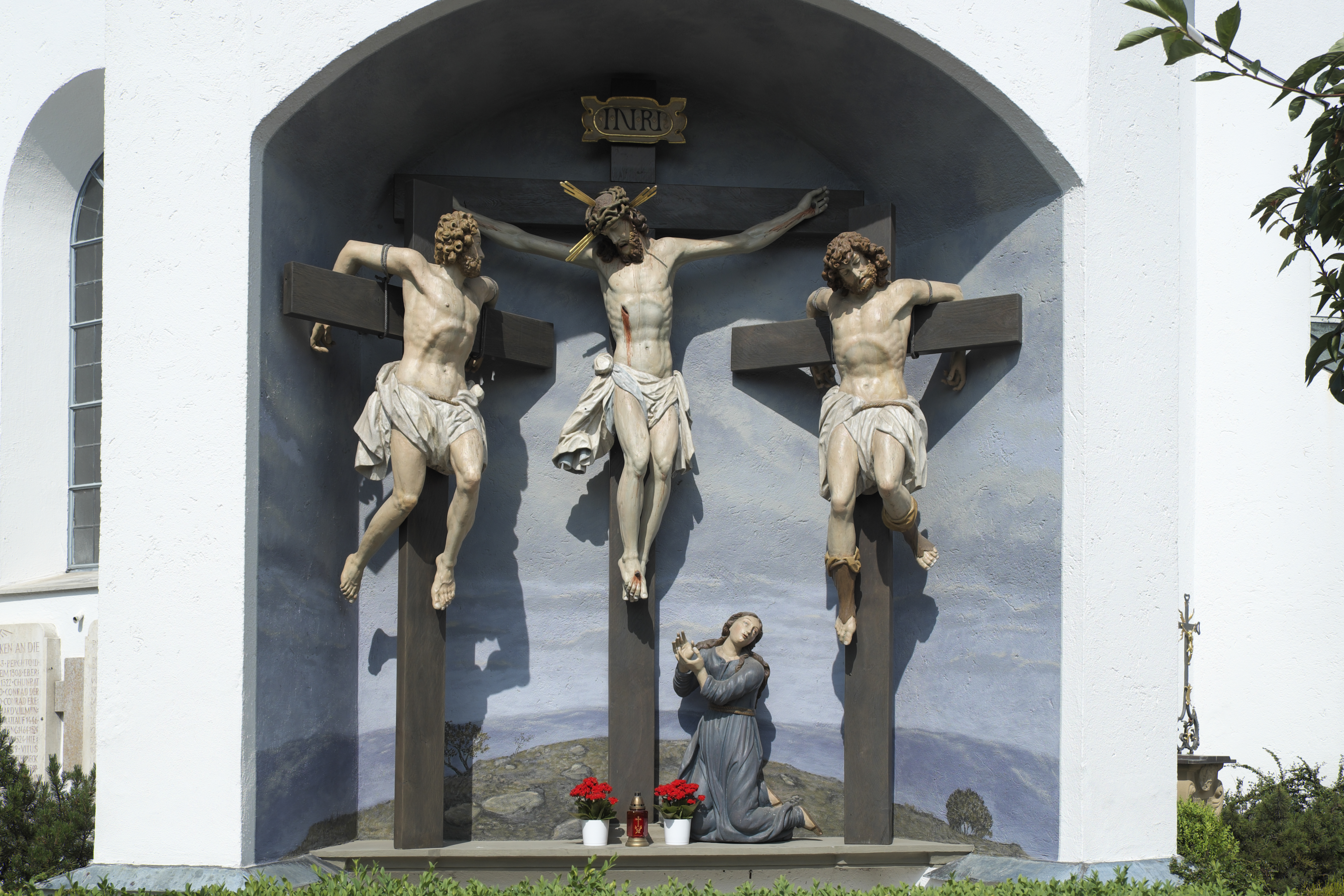 Katholische Pfarrkirche St. Vitus in Maisach im Landkreis Fürstenfeldbruck (Bayern/Deutschland), Kreuzigungsgruppe von 1753 an der Außenwand